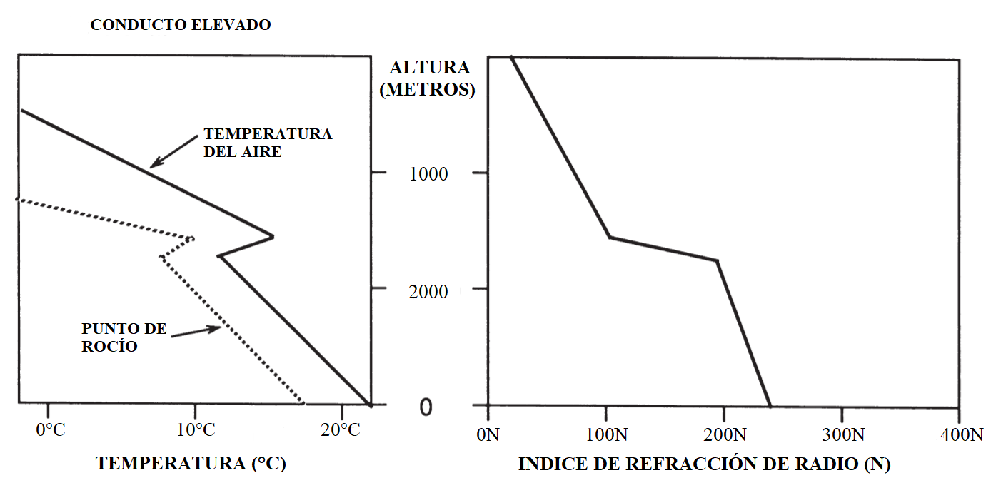 indice de refracción de radio